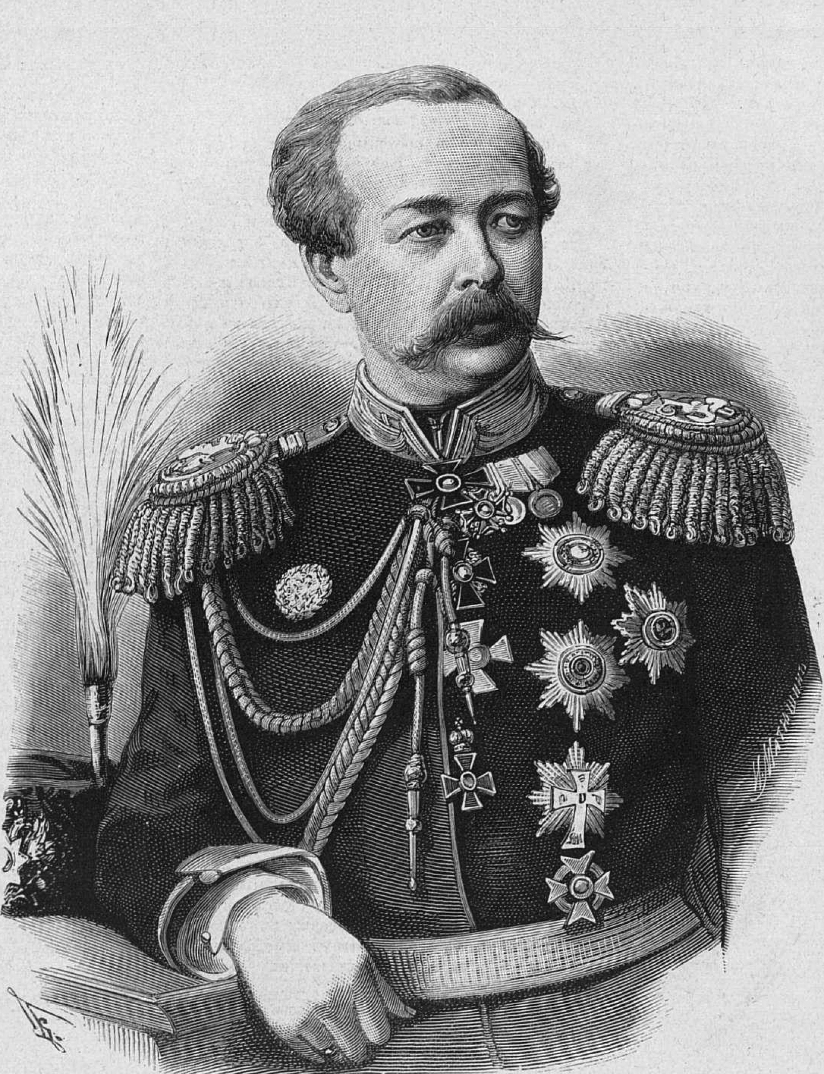 Казнаков, Николай Геннадьевич (1823—1885) — генерал от инфантерии, генерал-адъютант. Это изображение было также использовано для иллюстрирования статьи «Казнаков, Николай Геннадиевич» опубликованной в одиннадцатом томе «Военной энциклопедии», который был издан книгоиздательским товариществом И. Д. Сытина в 1913 году в столице Российской империи городе Санкт-Петербурге.